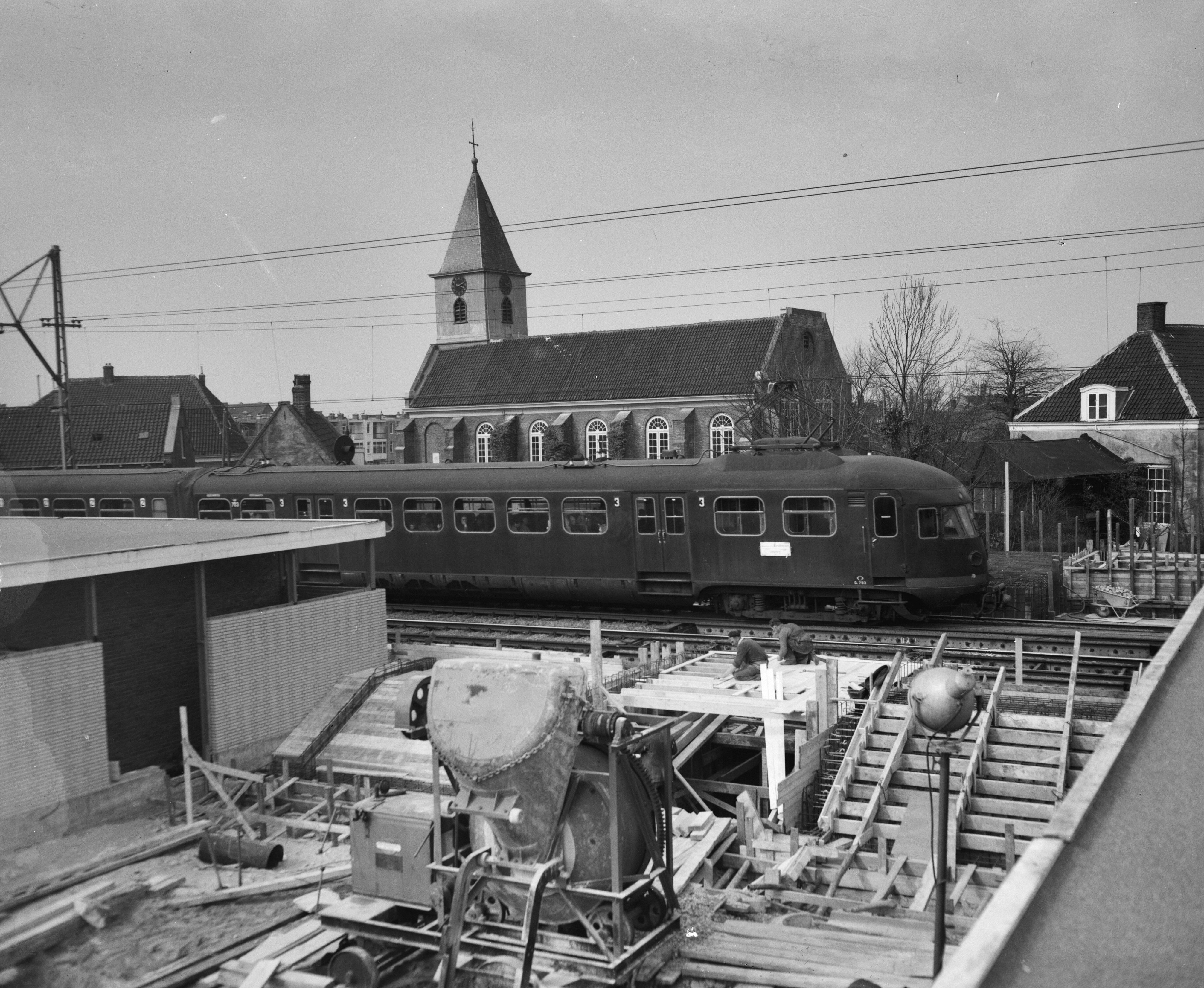 Collectie / Archief : Fotocollectie Anefo Reportage / Serie : [ onbekend ] Beschrijving : Bouw station te Sloterdijk Datum : 3 april 1956 Trefwoorden : STATIONS, bouw Fotograaf : Noske, J.D. / Anefo Auteursrechthebbende : Nationaal Archief Materiaalsoort : Negatief (zwart/wit) Nummer archiefinventaris : bekijk toegang 2.24.01.04 Bestanddeelnummer : 907-6736 Reacties Geplaatst door Maaike op 21 juli 2013 - 18:11. NS station Sloterdijk Plaats: Amsterdam; Noord-Holland